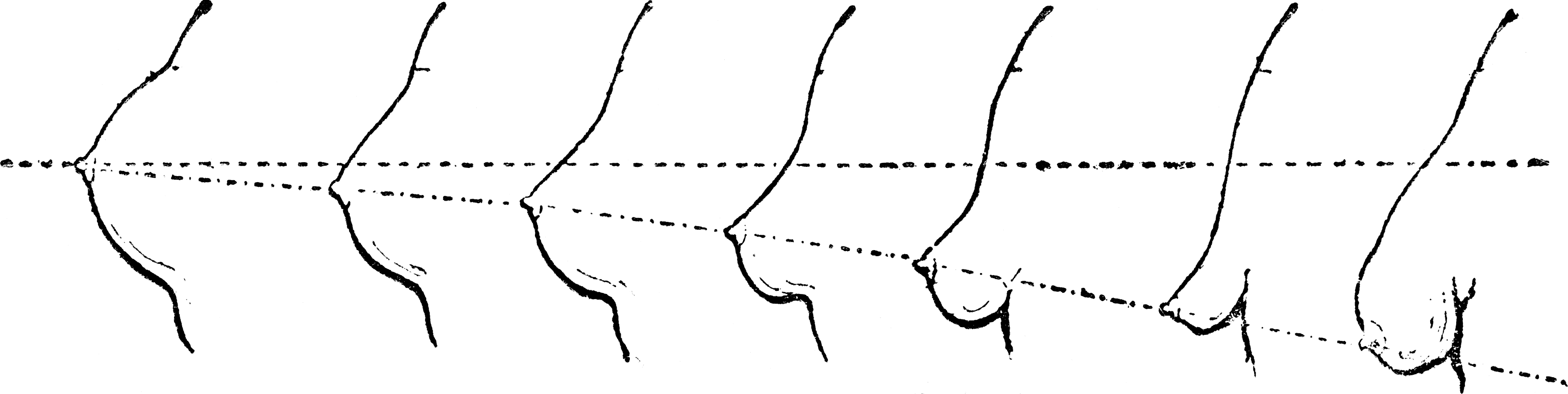 Les trois stades de l'affaissement des seins.